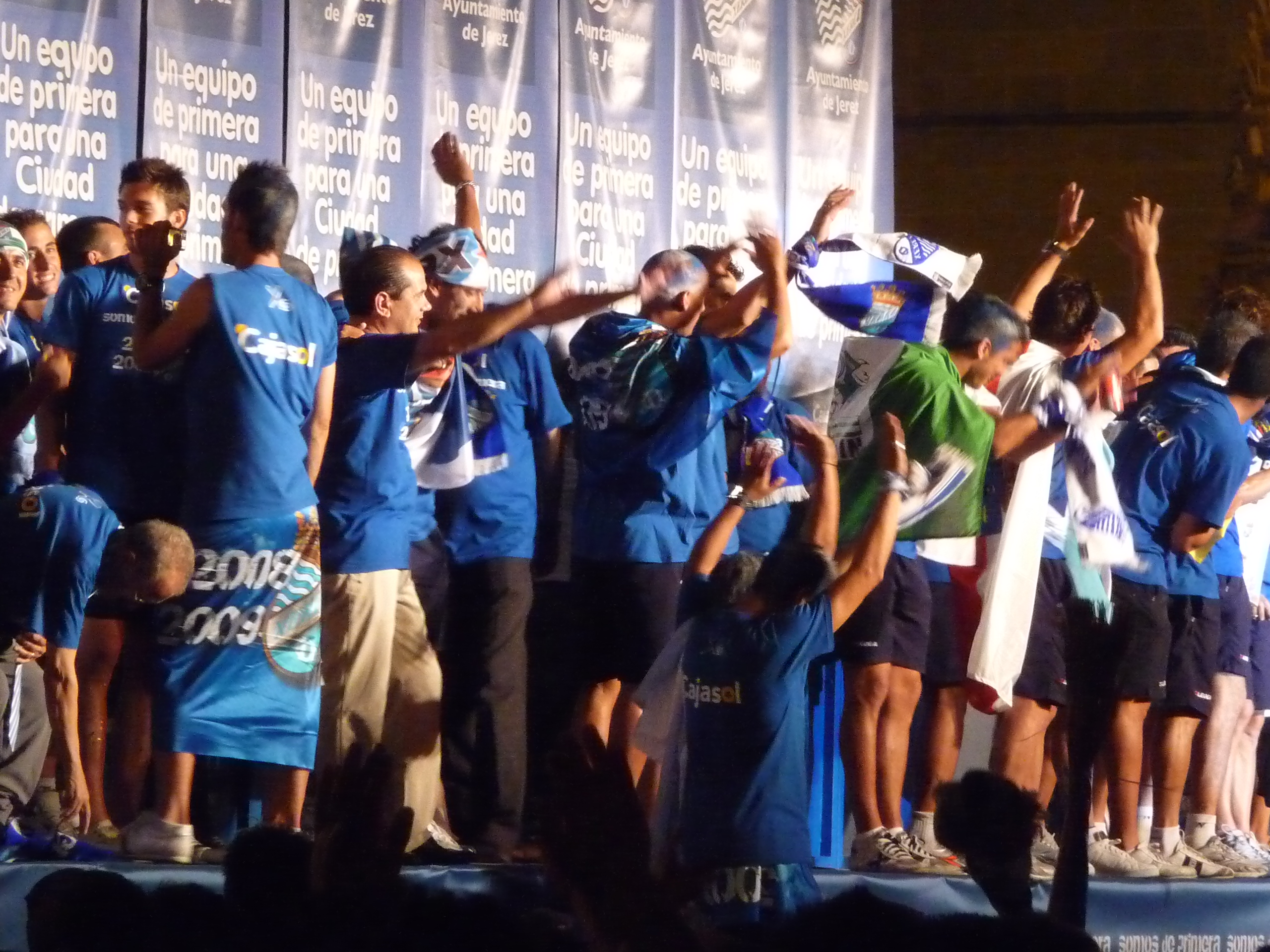 Ascenso-XerezCD-P1030075.JPG